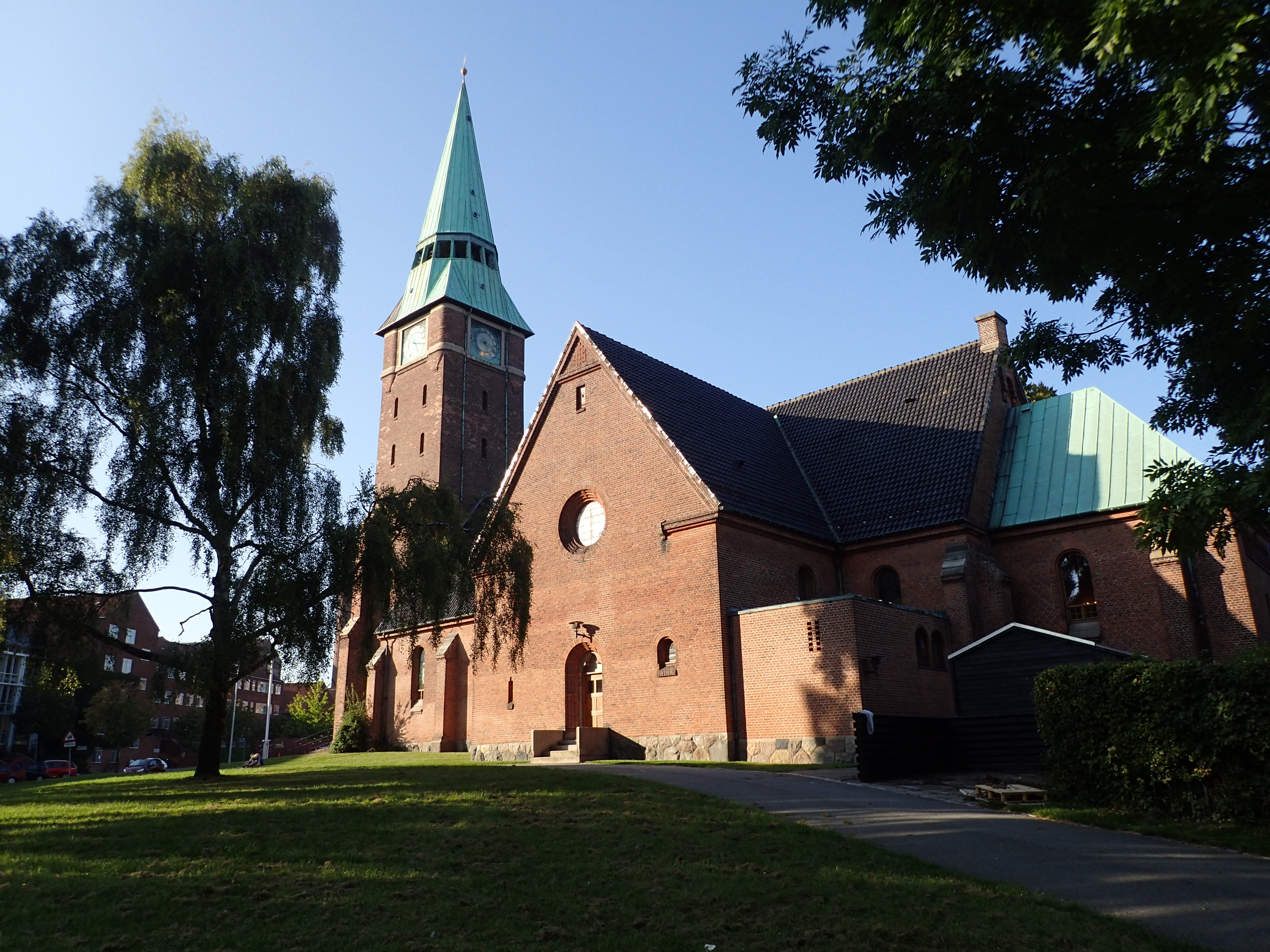 Sankt Johannes Kirke (Aarhus)